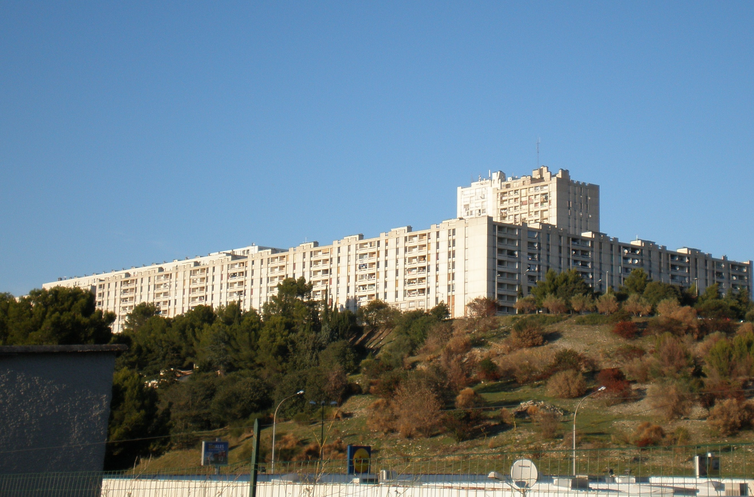 Vue du quartier de Valdegour (ZUP Nord) à Nîmes, Grand ensemble de logements construits dans les années 1960